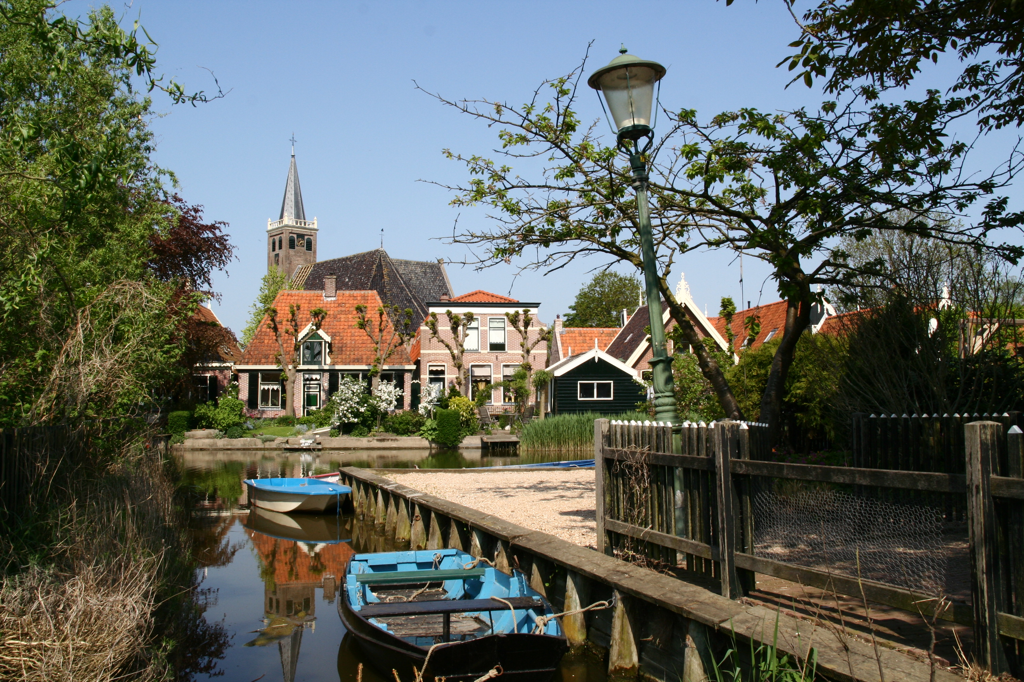 Description: Insteekhaven van de oude scheepswerf op het Keern te Kolhorn *Source:Eigen werk *Date:11-05-2006 *Author:Frans Koomen - Kolhorn